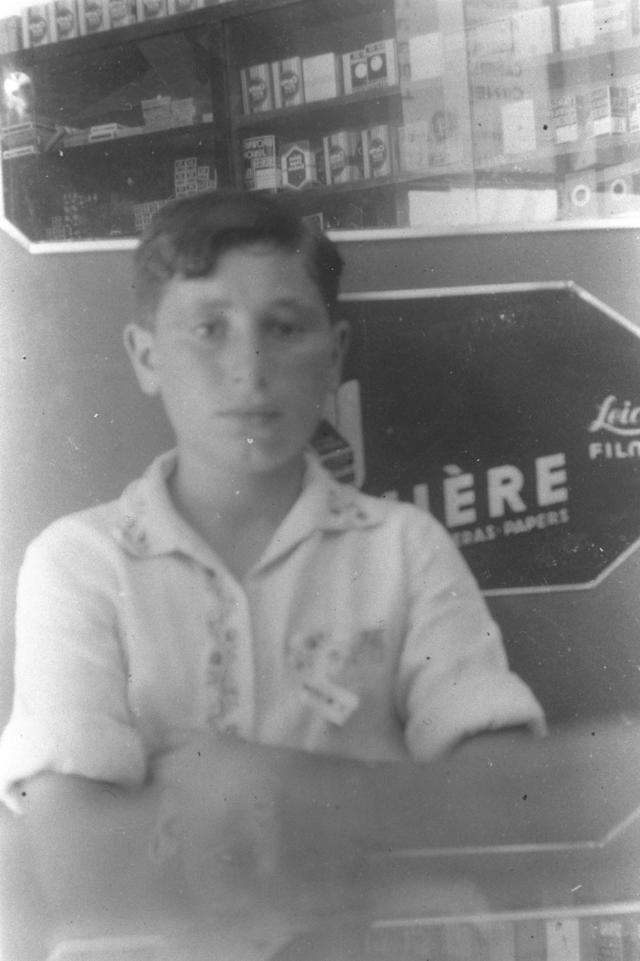 A picture of 13-year-old Shimon Persky (Peres) taken in Poland before his family immigrated to Israel. צילום מילדותו של שמעון פרס בהיותו בן 13, טרם עלייתו לישראל עם הוריו מפולין. 08/01/1936